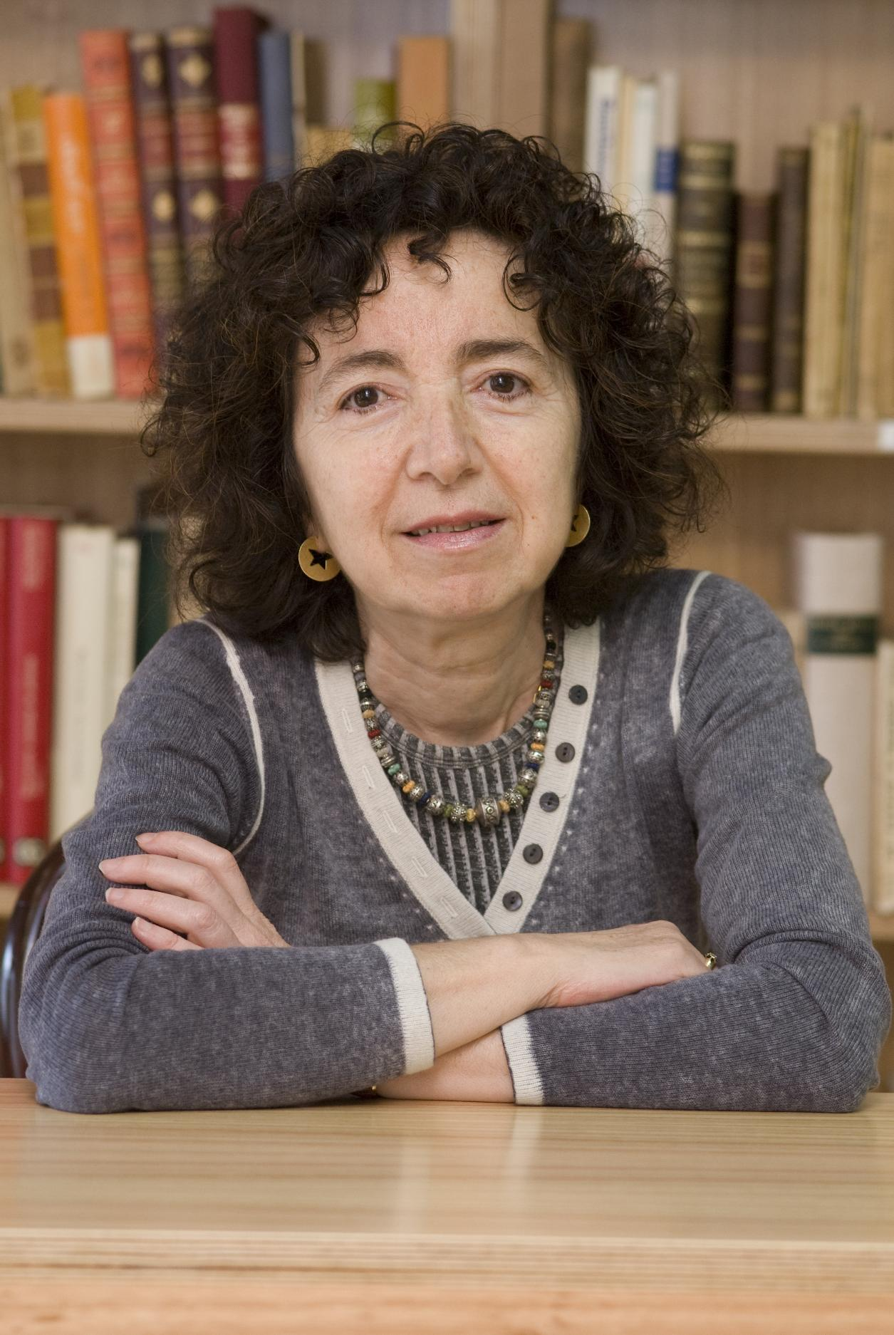 Marilar Aleixandre. Foto da AELG